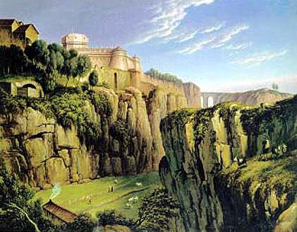 Die Festung von Civita Castellana im 19. Jahrhundert